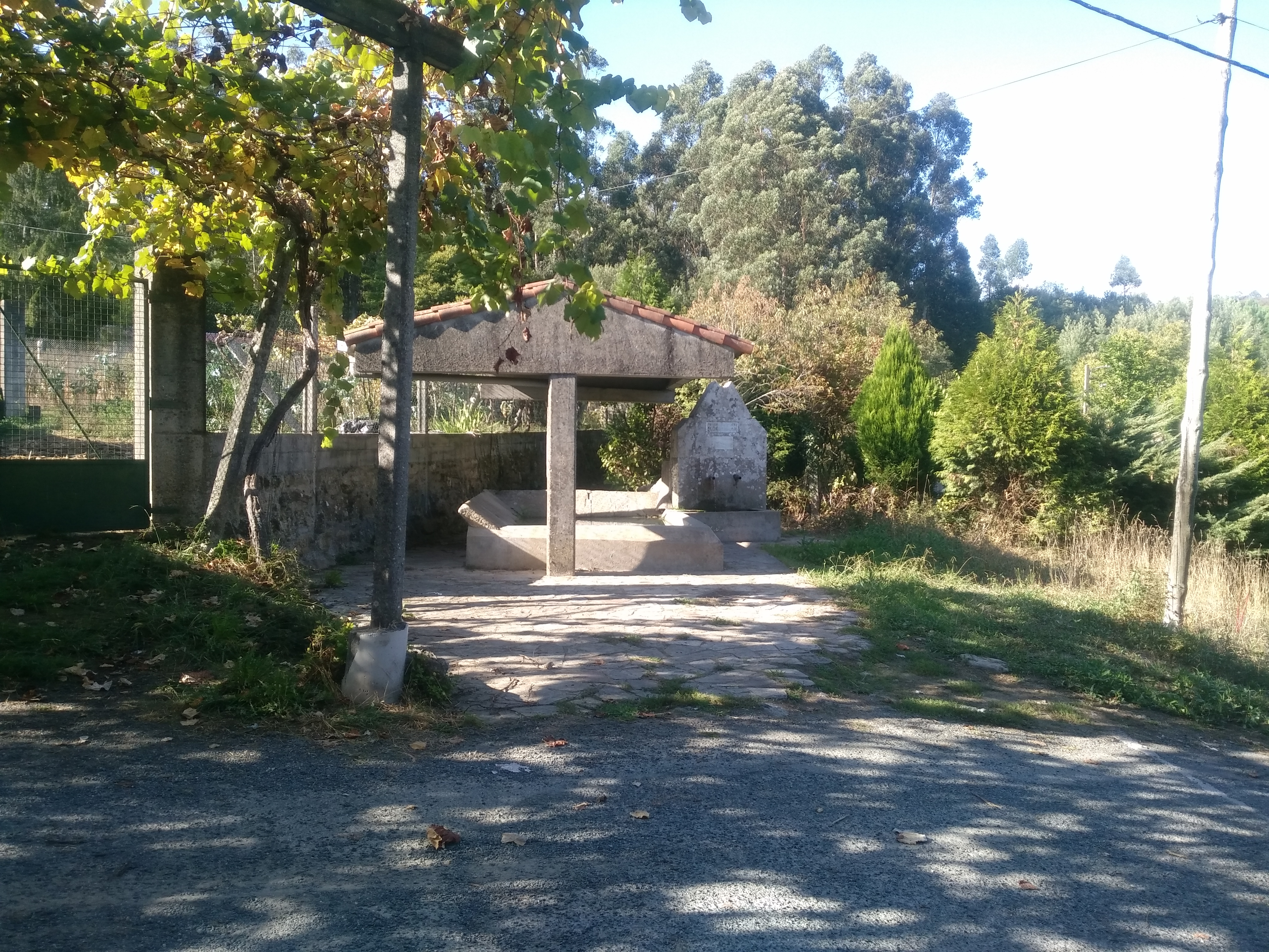 Lavadeiro da aldea de Tourís